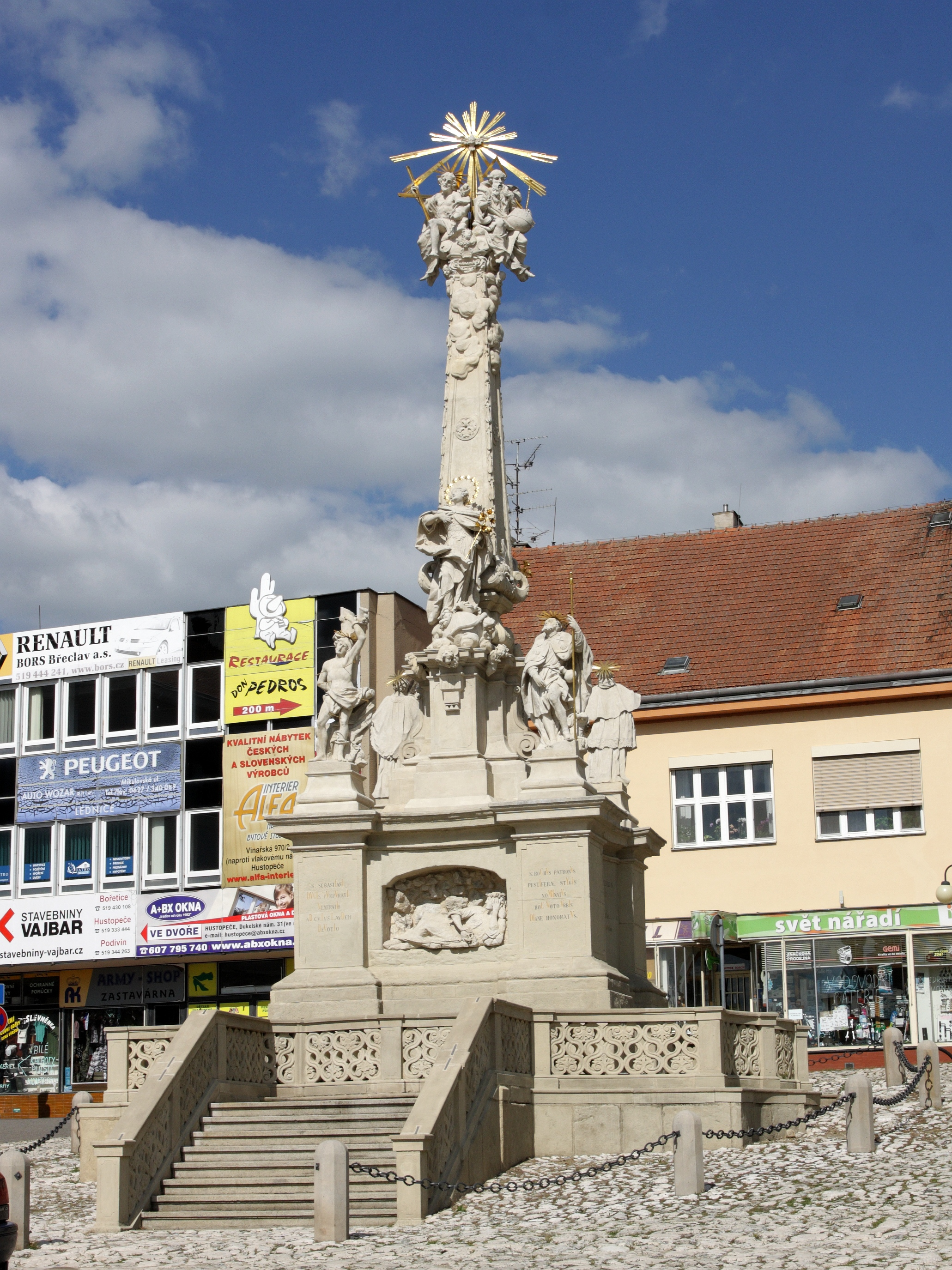 Hustopeče - sloup Nejsvětější Trojice.